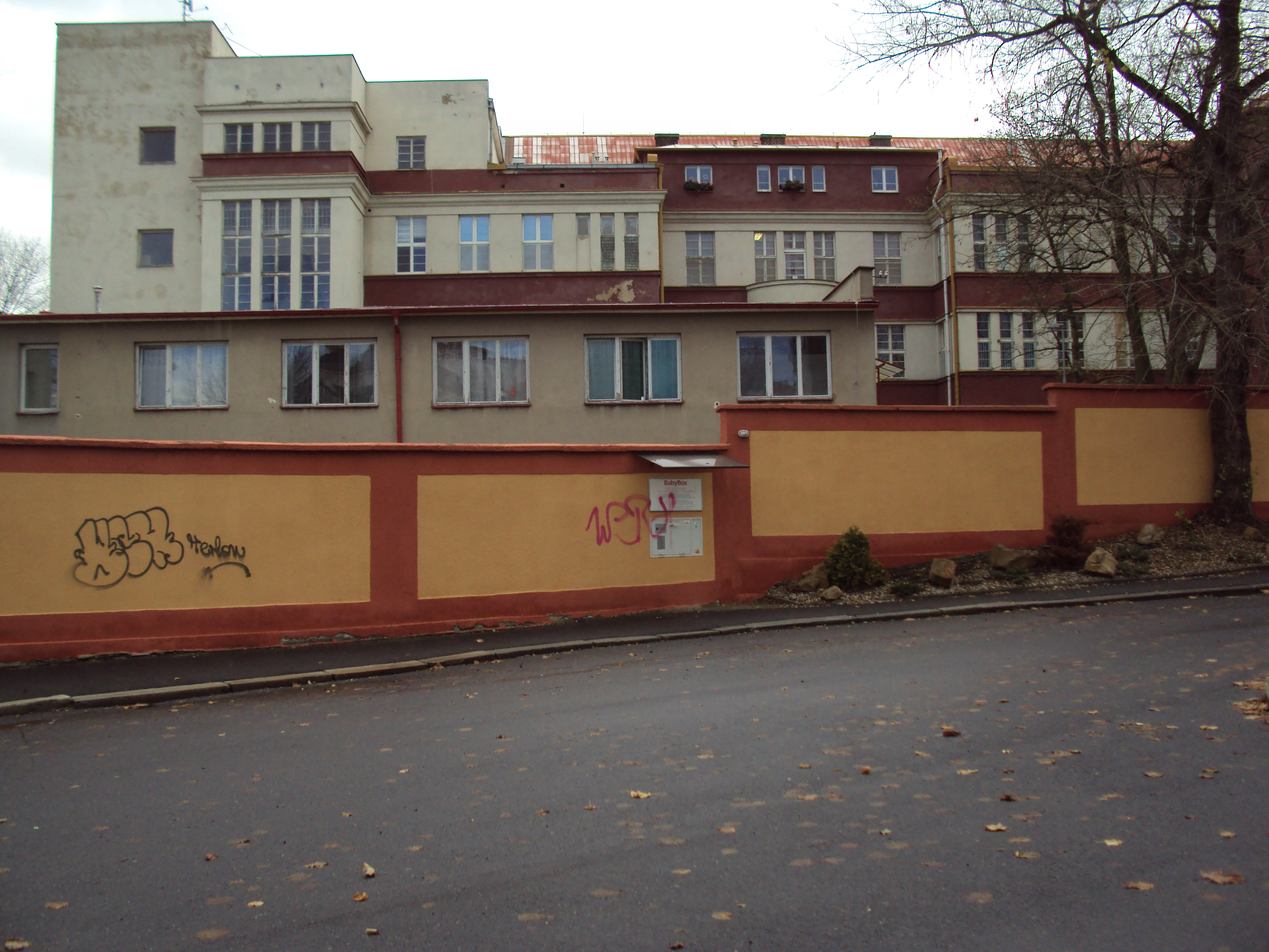 Baby Box na zastrčené boční straně nemocnice v Teplicích, čtvrť Řetenice